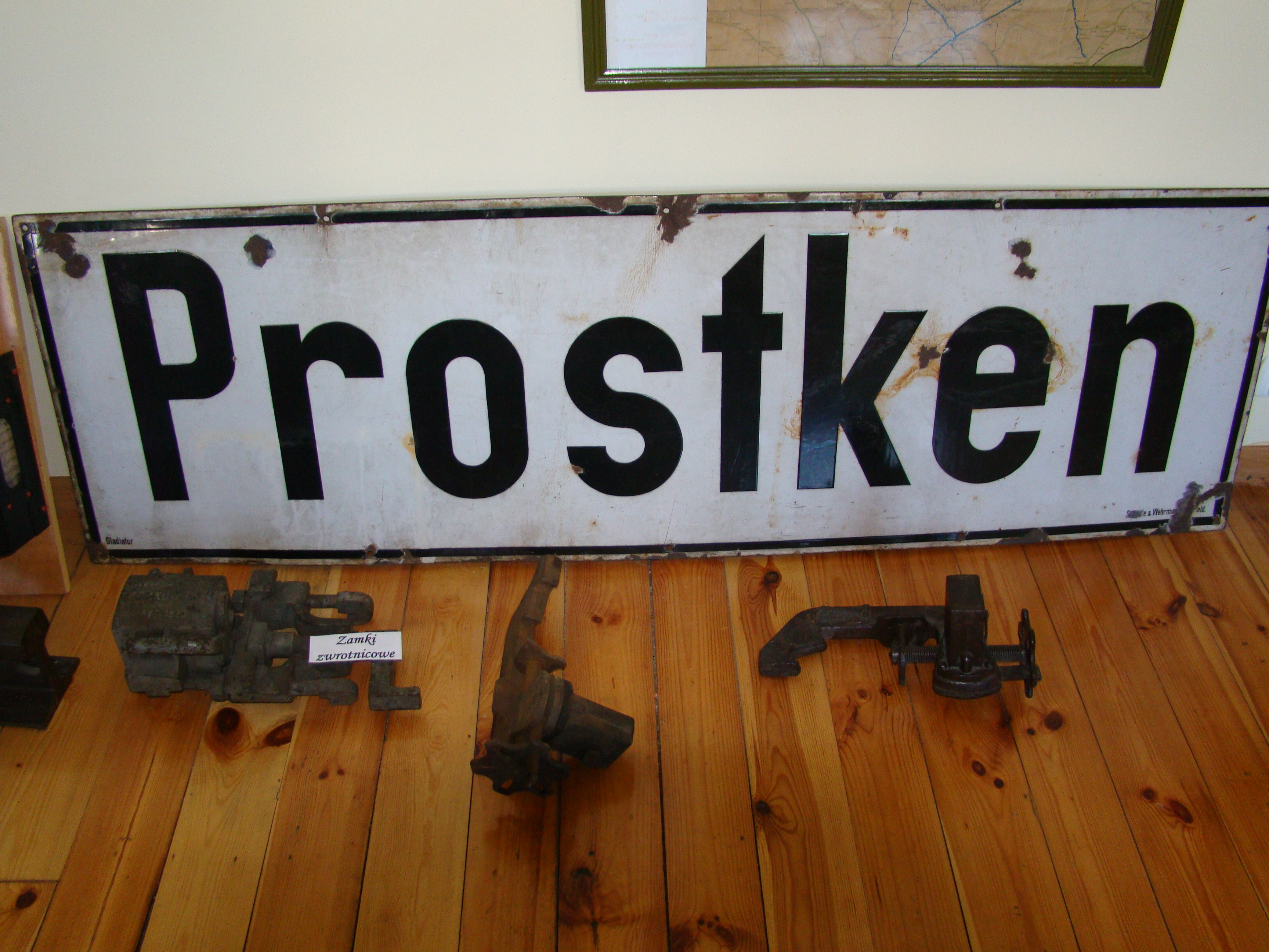 Muzeum Zabytków Kolejnictwa w Ełku